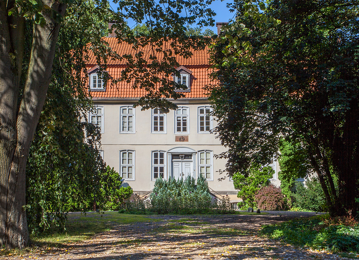 Wasserschloss in Reelkirchen (Blomberg), Kreis Lippe This is the photograph of an architectural monument. It is part of the list of cultural monuments of Blomberg, no. 7